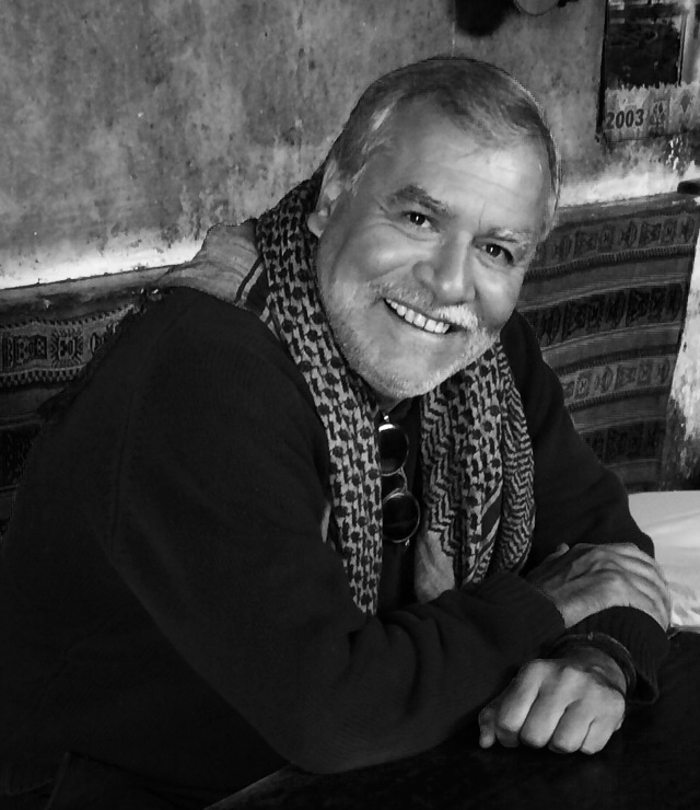 José Ugaz